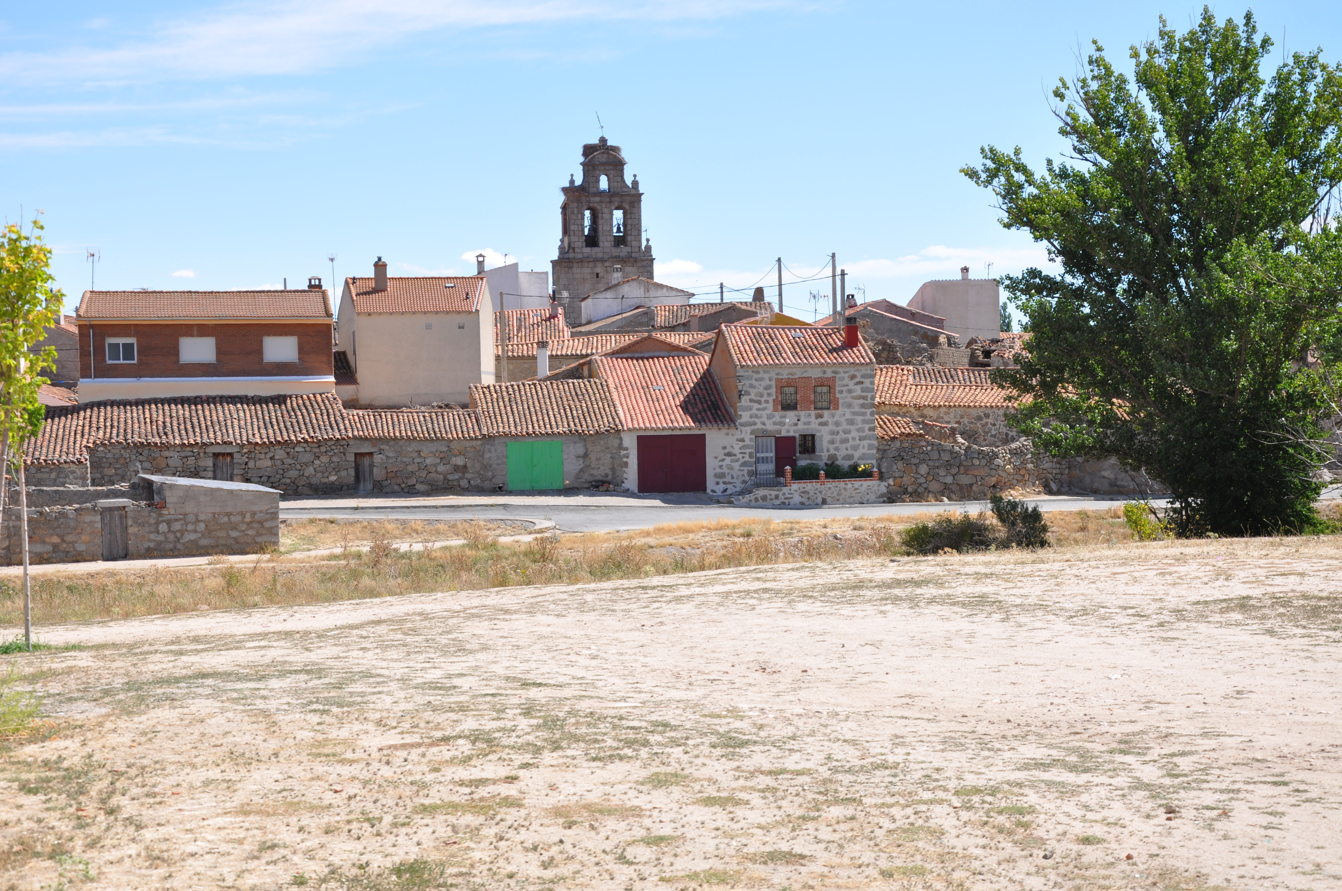 Panorámica de Blacha desde El Cerrillo.